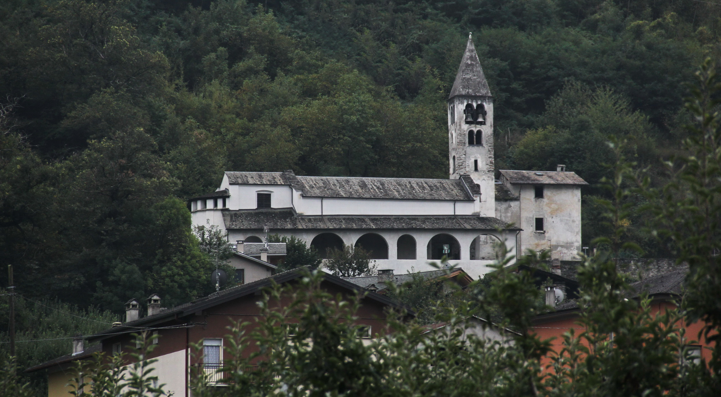 Chiesa di Sant'Alessandro, Lovero, Italy